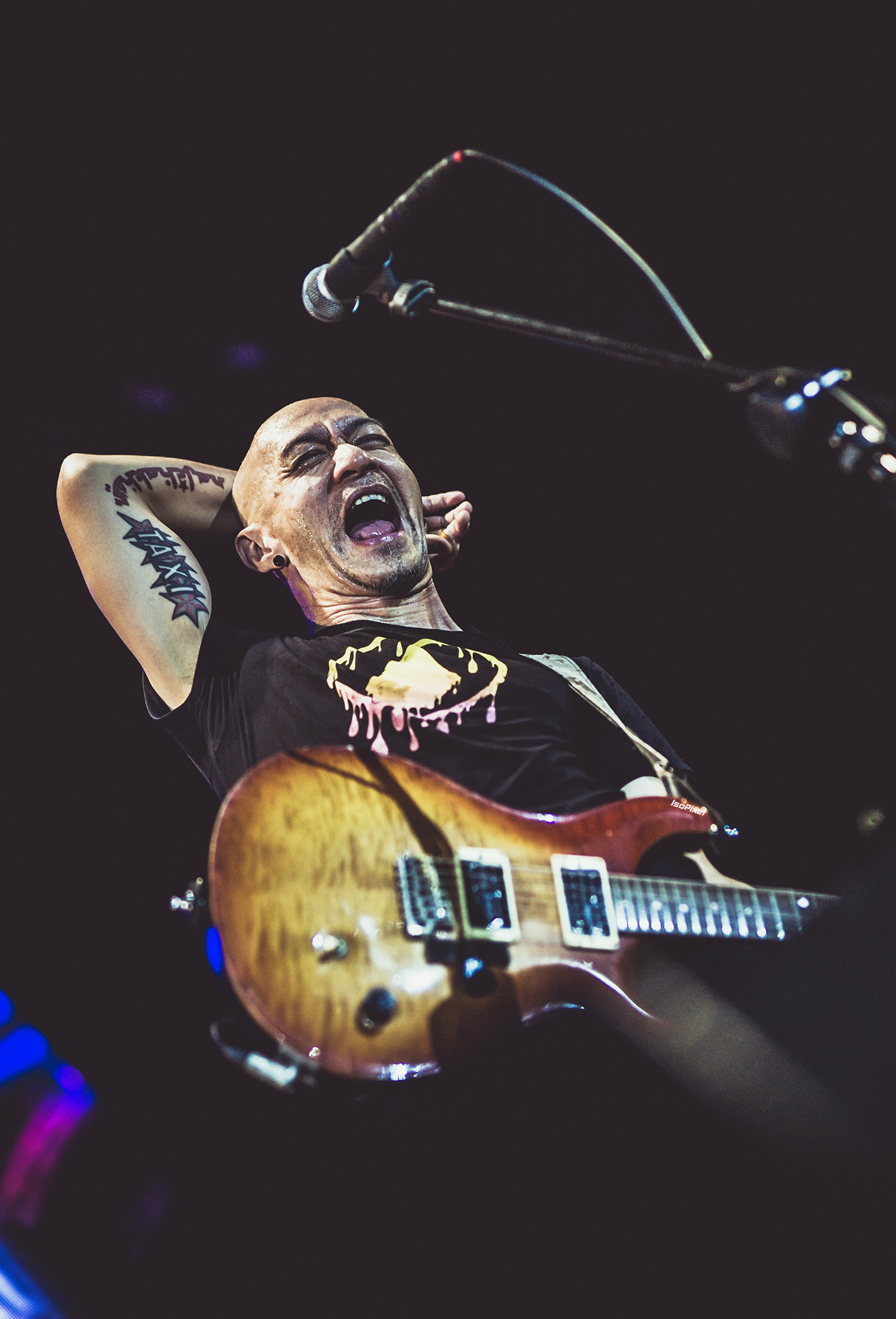 KOB Taxi at Tawandaeng 20 Feb 2018 Picture by Sébastien Husson - IsoPixel Bangkok IsoPixel.fr